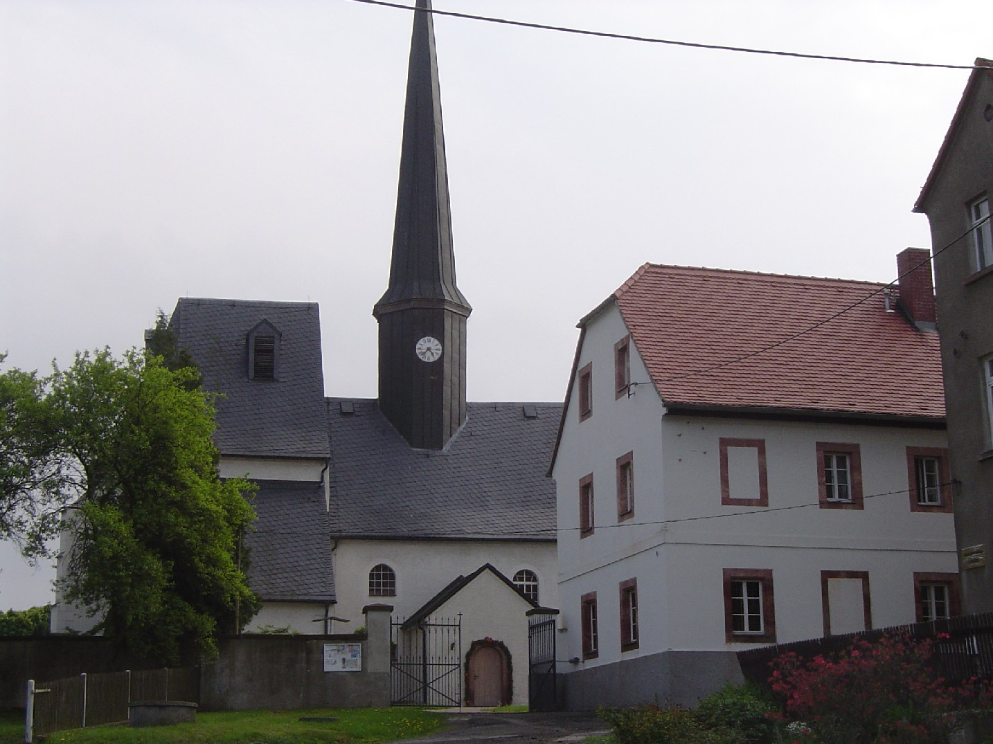 Vorderseite der Kirche zu Jahnshain, links der gotische, rechts der romanische Teil